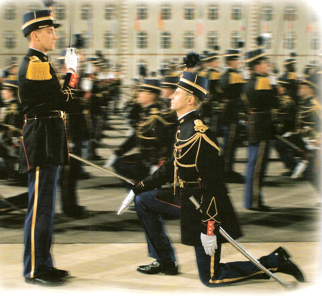 Tenue de prestige de l'Ecole des Officiers de la Gendarmerie Nationale.